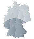 Süddeutschland Southern Germany